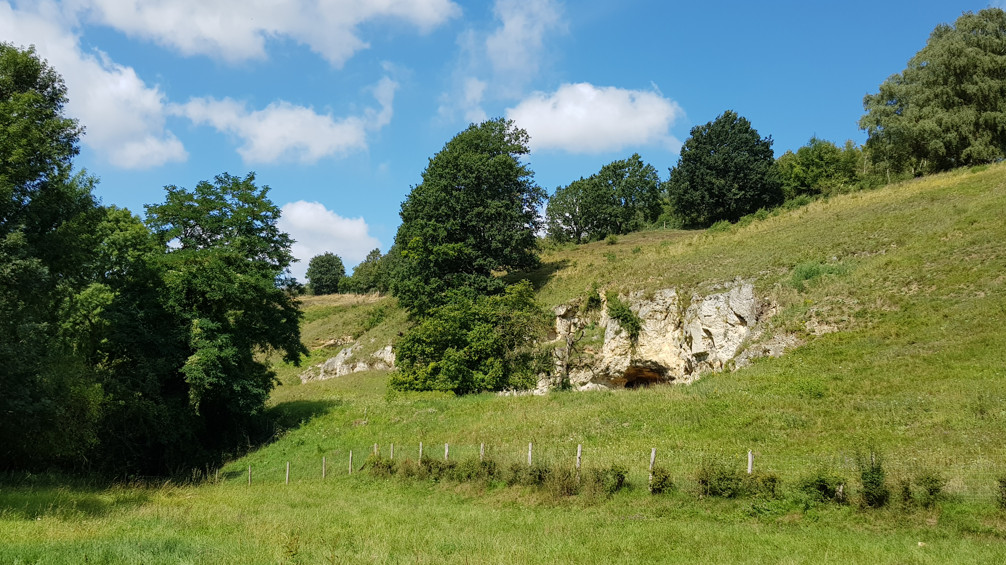 Cluysberggroeve, Bemelen, Nederland